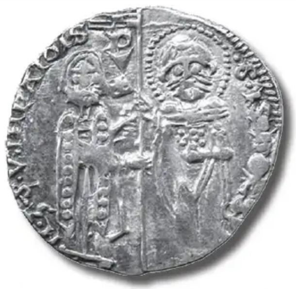 Moneda de Martino Zaccaria.